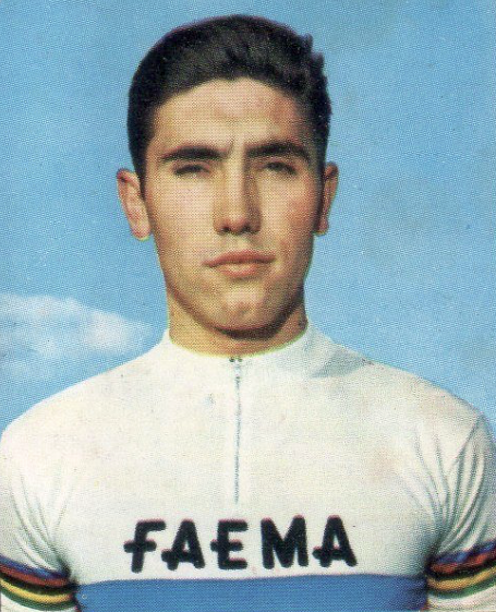 Eddy Merckx en 1967-68 - Campioni dello Sport 1968-1969, n°173.